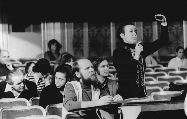 ADN-ZB Sturm-14.2.74 Berlin: "Die Oper Einstein" von Paul Dessau erlebt am 16.2.1974 in der Staatsoper zu Berlin ihre DDR-Uraufführung. Ruth Berghaus (stehend), die Gattin des Komponisten, inszenierte das Werk. Unter ihrer Regie gelangten schon drei andere Opern von Dessau in der Oper Unter den Linden zur Aufführung. Das Libretto zur "Einstein"-Oper schrieb Karl Mickel. Die musikalische Leitung liegt in den Händen von Otmar Suitner. Andreas Reinhardt schuf die Gesamtausstattung, die Choreinstudierung übernahm Ernst Stoy.